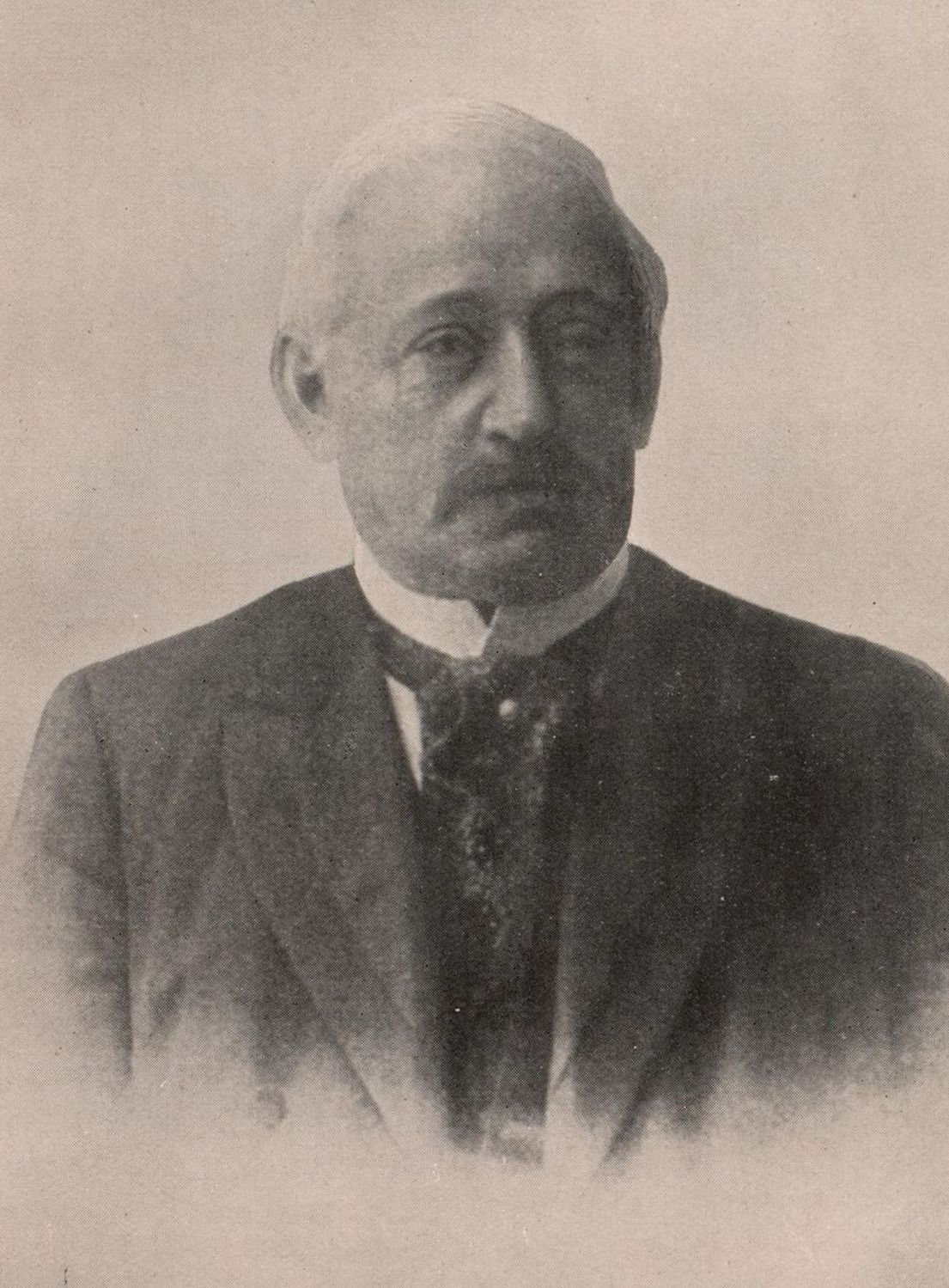 Porträtfoto von Paul Labend